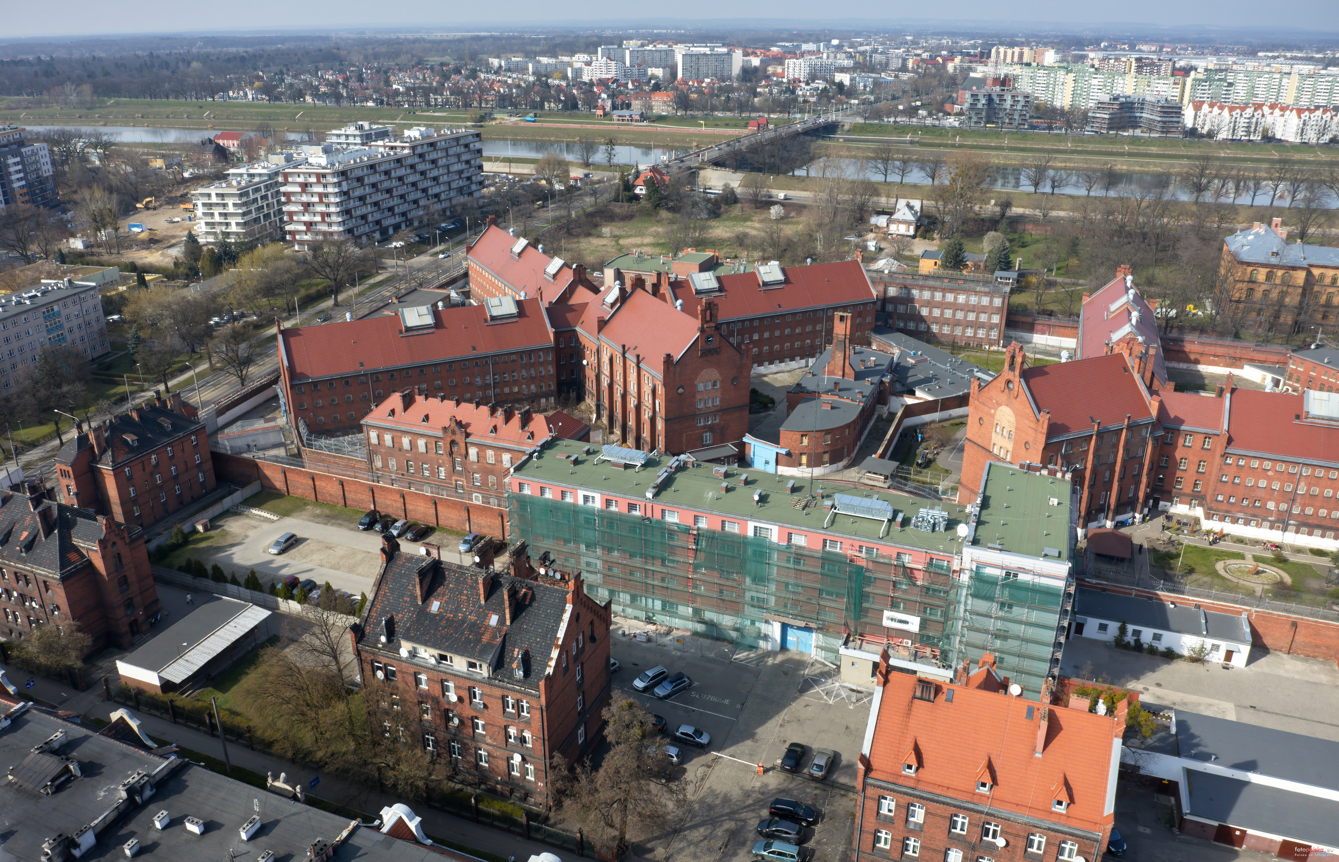 Wrocław - Kleczków: Rejonowy Zakład Karny nr 1